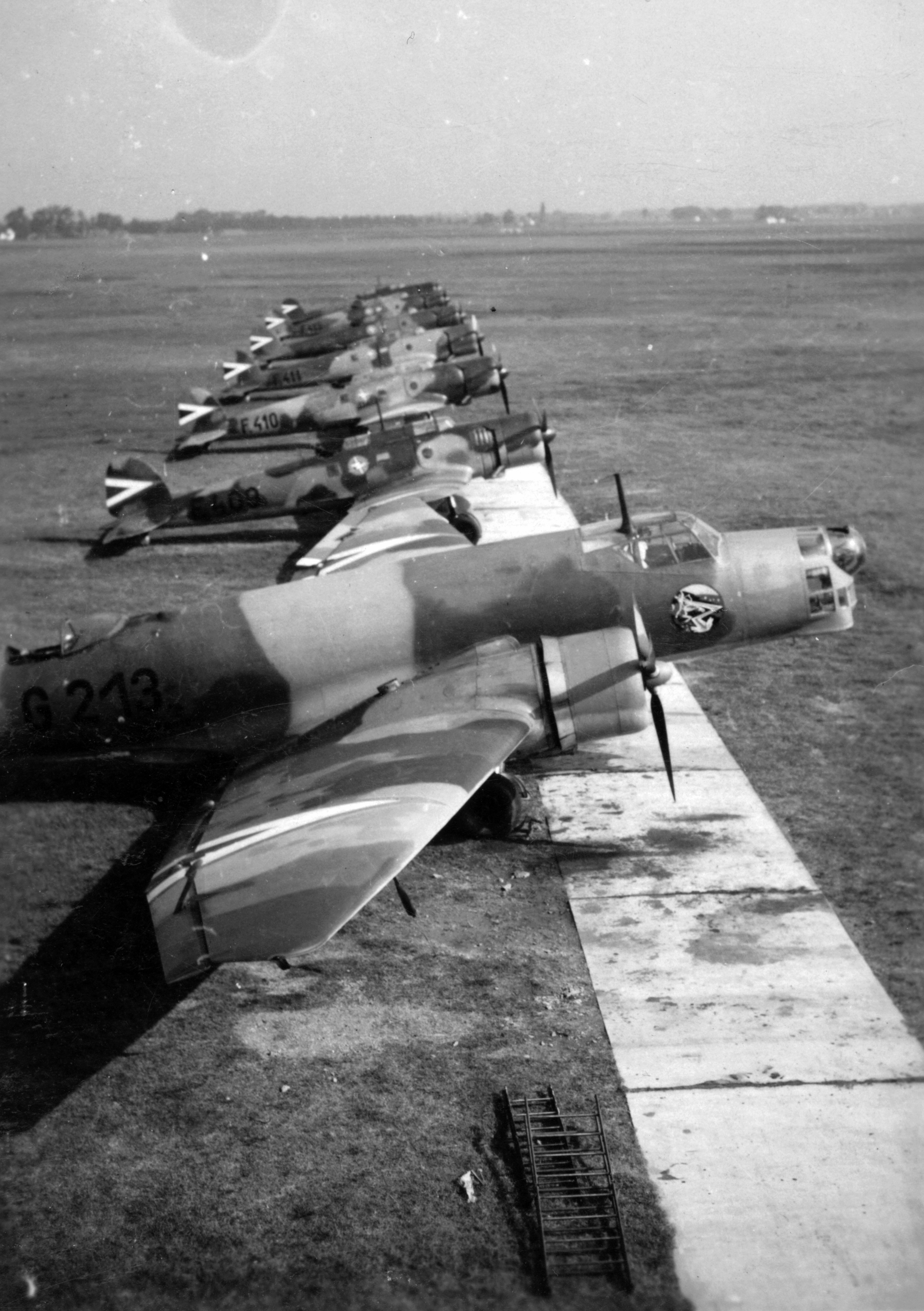 repülőtér. Előtérben egy Junkers Ju-86K-2 típusú repülőgép, háttérben Heinkel He-70K távolfelderítő repülőgépek sorakoznak. Location: Hungary Tags: Heinkel-brand, airport, transport, Gerrman brand, military, Junkers-brand, Royal Hungarian Air Force Title: repülőtér. Előtérben egy Junkers Ju-86K-2 típusú repülőgép, háttérben Heinkel He-70K távolfelderítő repülőgépek sorakoznak.